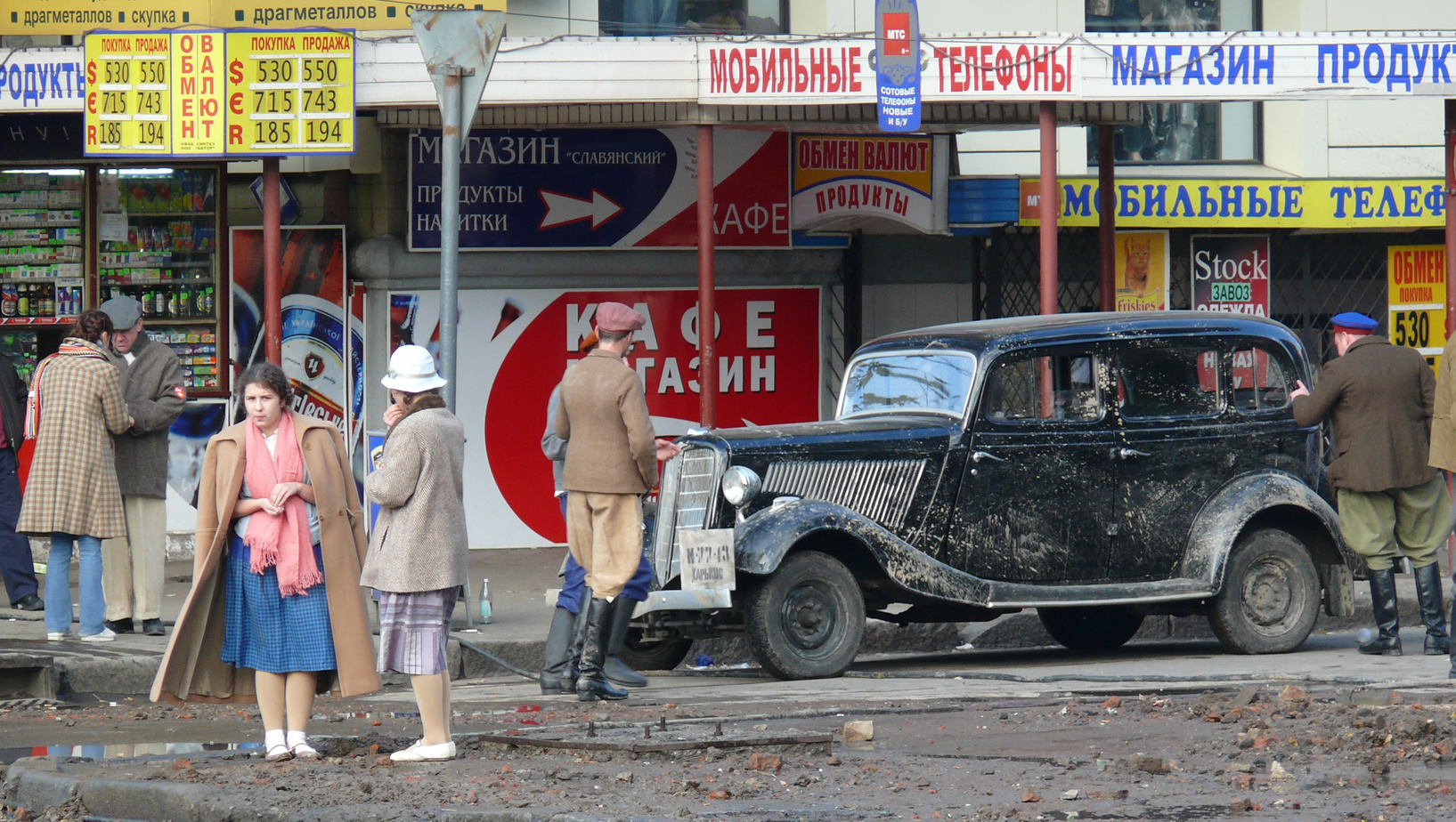 Съёмки фильма «Дау» на Привокзальной площади в Харькове.